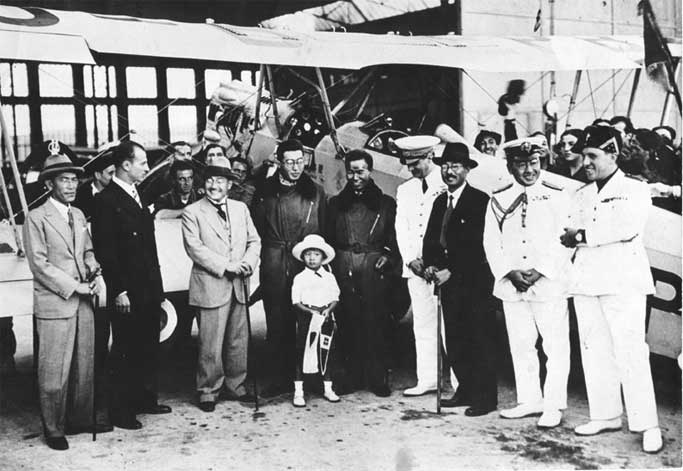 青年日本号ローマ到達